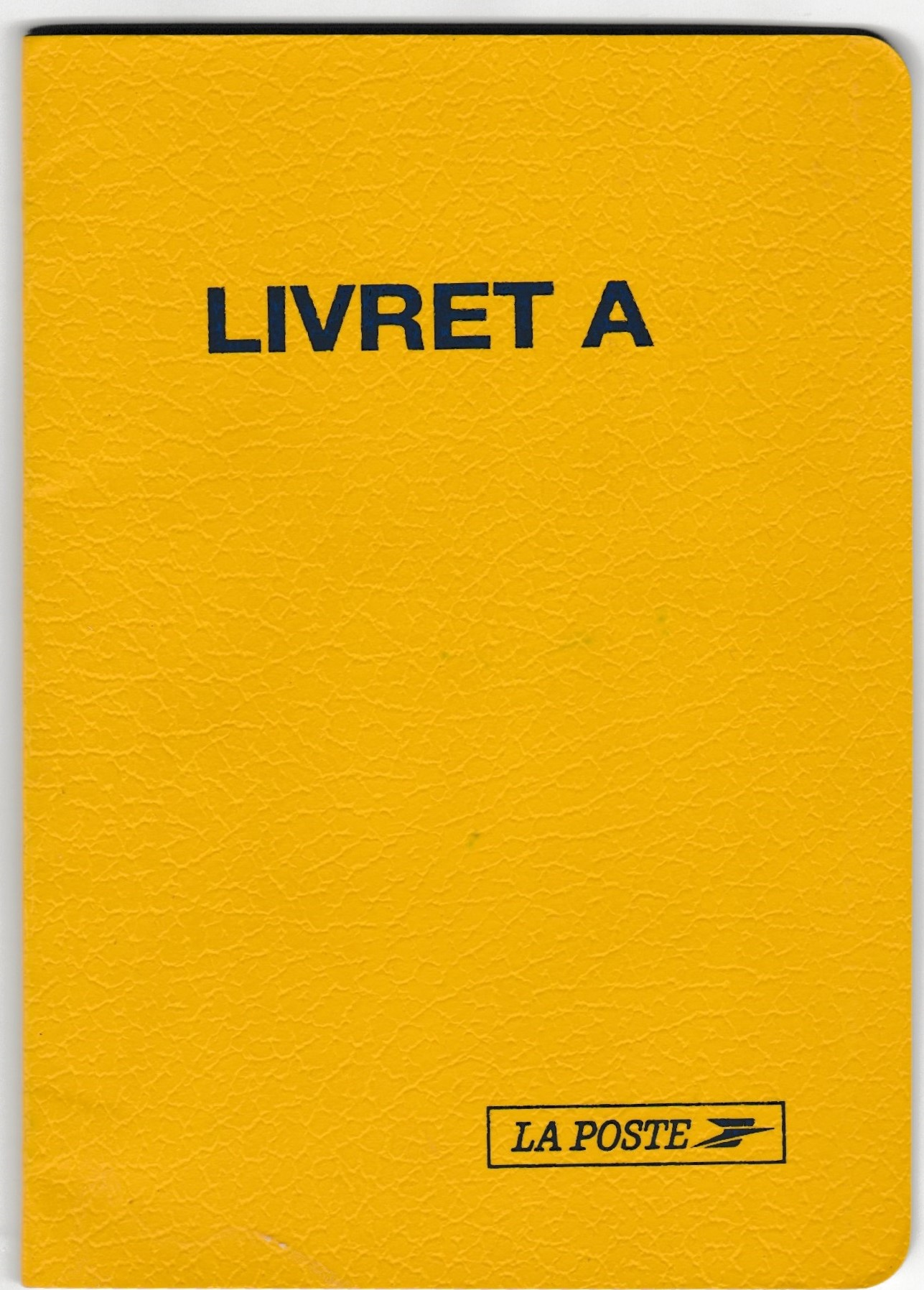 Aperçu d'un ancien livret A (papier) de La Poste (entreprise française)